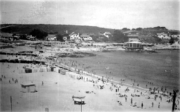 Playa Los Corsarios en el año 1964. El Quisco, Valparaíso, Chile. This image (or all images in this category/page) is very small, unfixably too light/dark, or may not adequately illustrate the subject of the picture. If a higher-quality image is available please consider replacing this one; otherwise, a replacement under a free license should be found or provided. Please see Category:Image cleanup templates for templates used to mark images that only need a clean-up. For more help, see Commons:Media for cleanup#Low quality pictures.